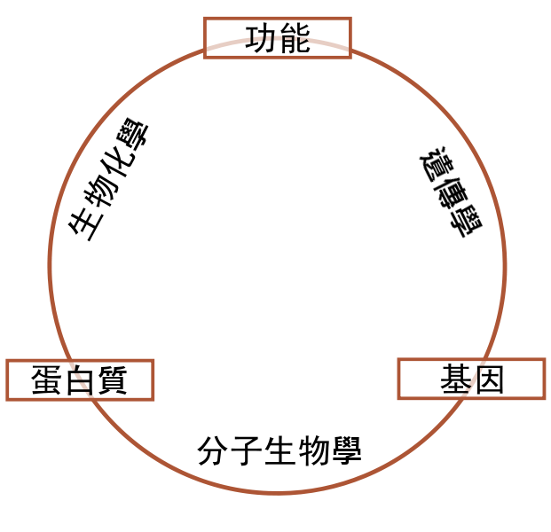 生物化學、遺傳學和分子生物學關係簡圖